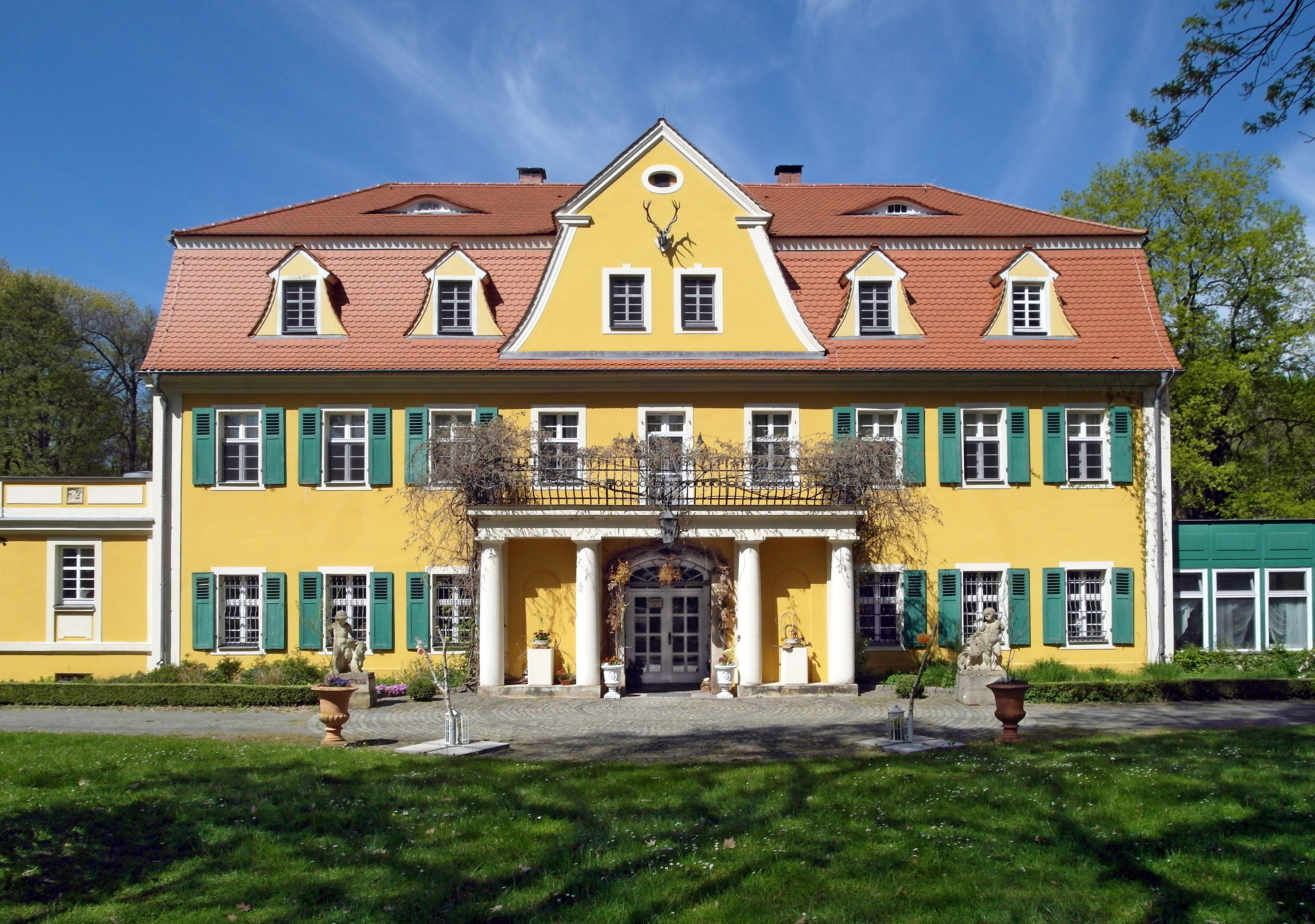 06.05.2016 02999 Weißig (Lohsa): „Fledermausschloß Weißig“ (GMP: 51.331251,14.392067), Am Eichberg 42. Das Anwesen geht auf das 17. Jahrhundert zurück. Der heutige Barockbau dürfte Mitte des 18. Jahrhunderts entstanden sein. Das Haus diente am Anfang des 20. Jahrhunderts als Jagdschloß d. Rittergutsfamilie derer von Steinitz-Kolbitz. 1921 wurde d. Gut Weißig von Ulrich Prinz von Schönburg-Waldenburg erworben. Das Schloß diente noch bis 1997 als Wohnhaus. 1996 kaufte Fam. Liepert das Anwesen und sanierten es. 1998 war die Eröffnung als "FLEDERMAUSSCHLOSS" Weißig. [SAM5721.JPG]20160606525DR.JPG(c)Blobelt Hornjoserbsce: Hród z 18. lětstotka we Wysokej pola Łaza.